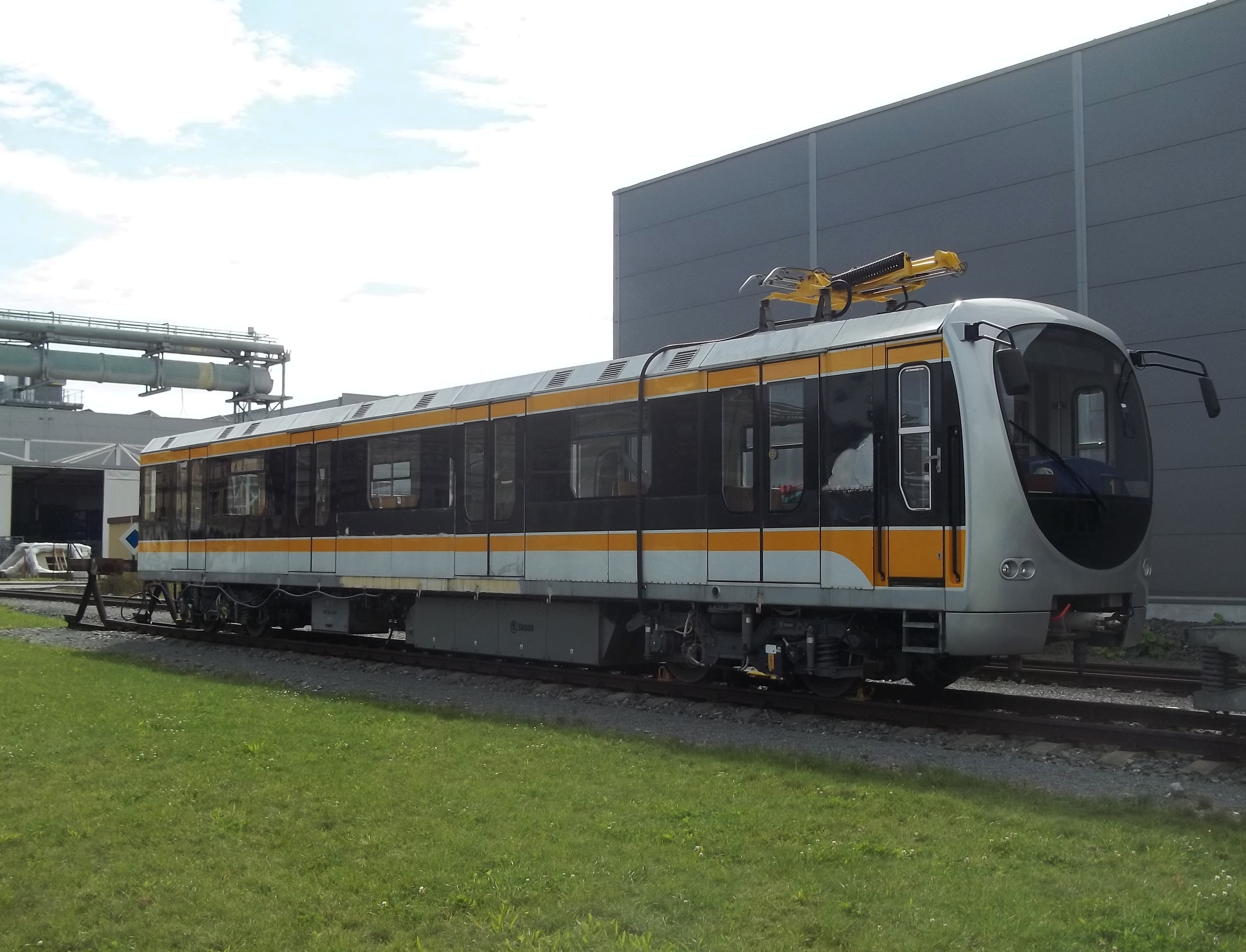 Škoda 6MT